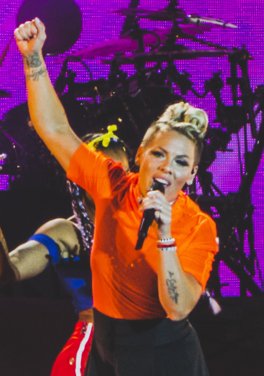 PinkVFest190817-54